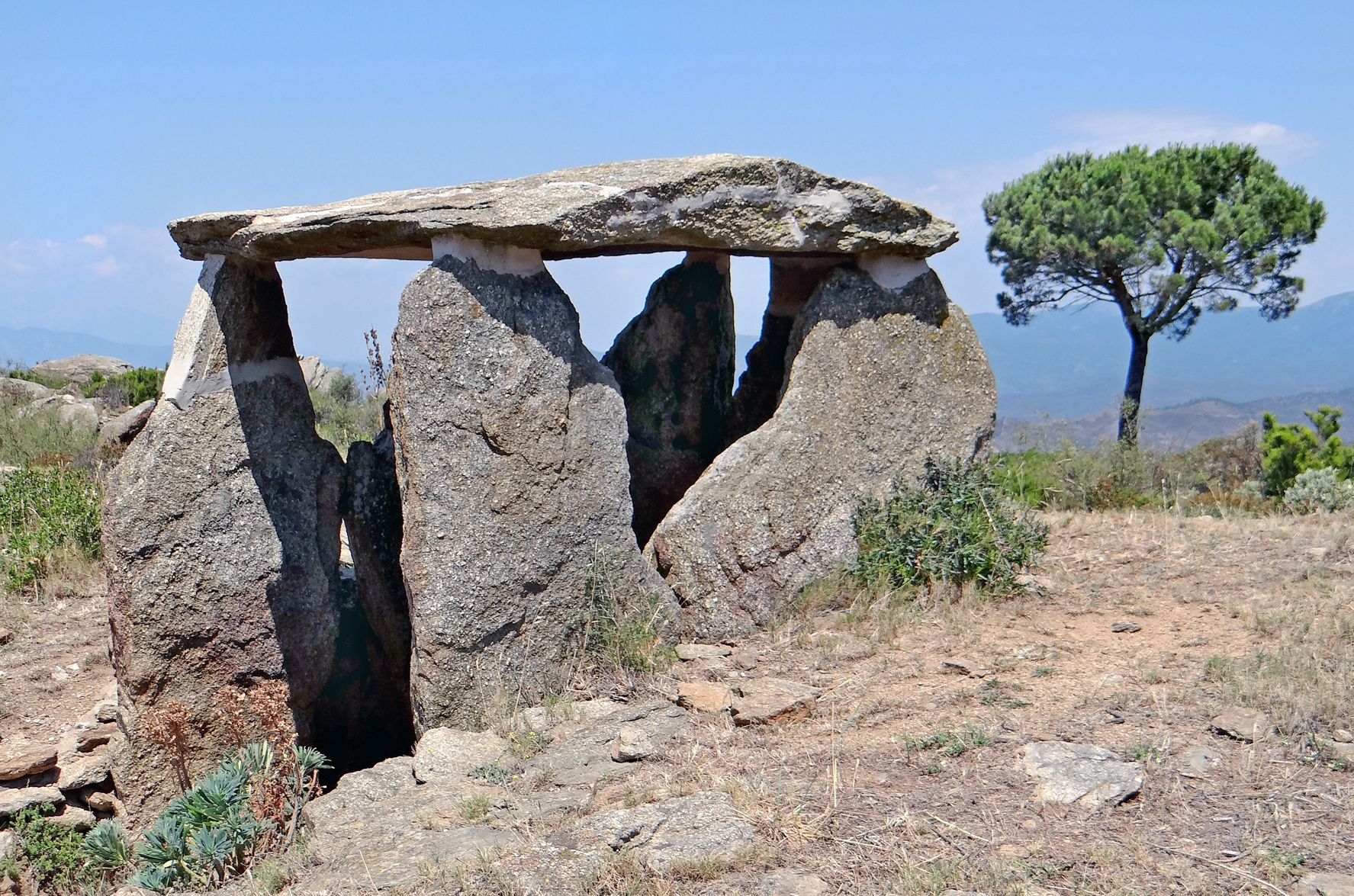 Dolmen Vinyes Mortes I Chambre funéraire mégalithique Seconde moitié du IIIè millénaire avant JC altitude 360 m Commune de Gerona Catalogne, Espagne